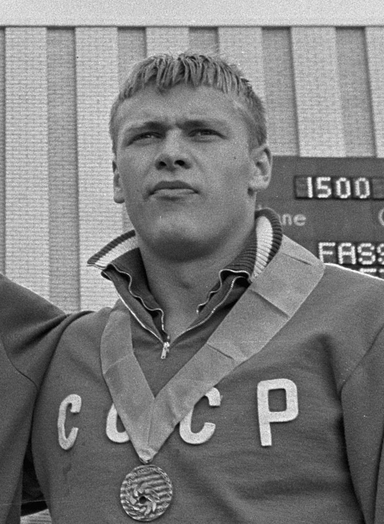 Aleksandr Pletnyev, European championships